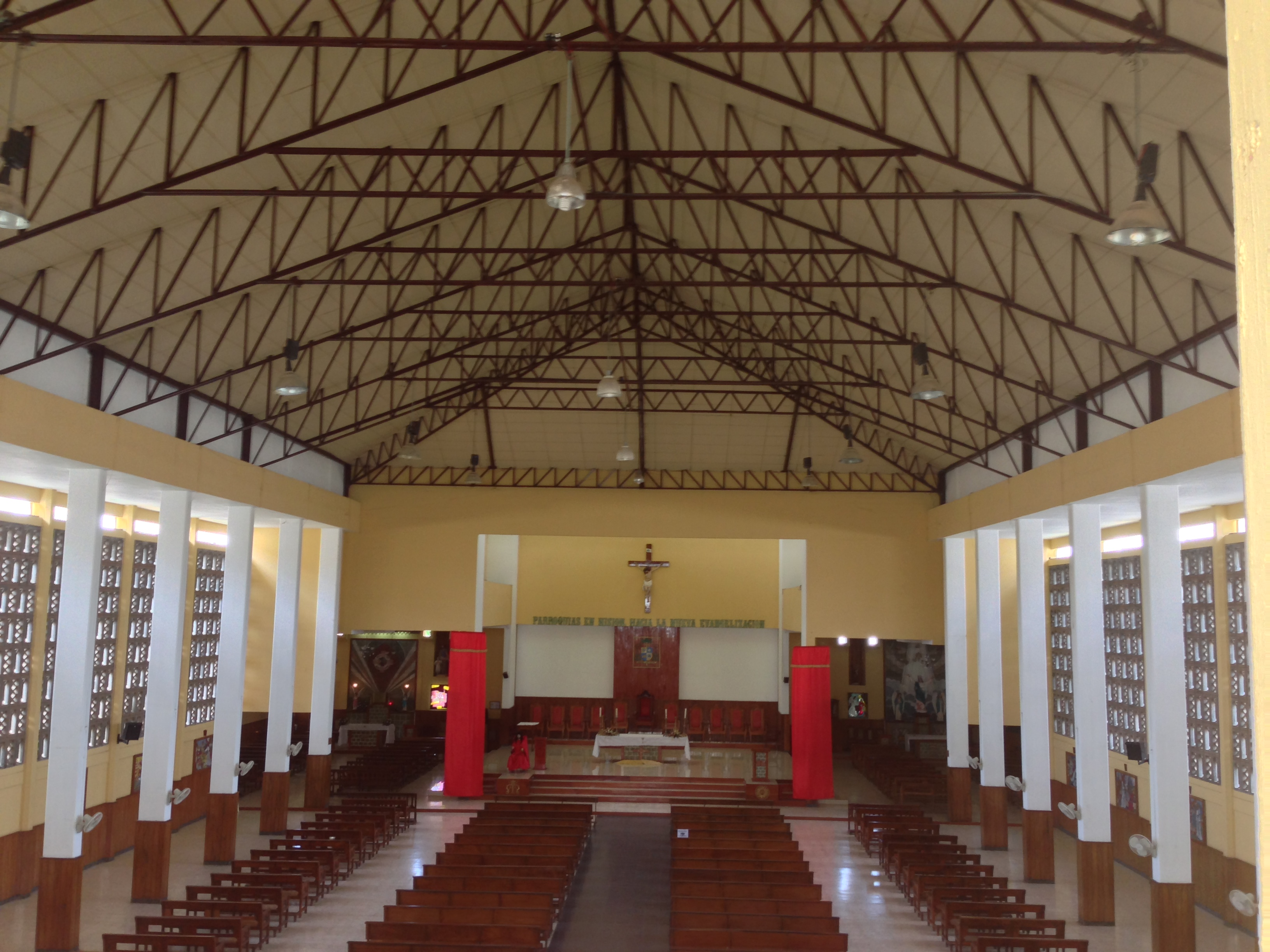 Vista de la catedral de juigalpa